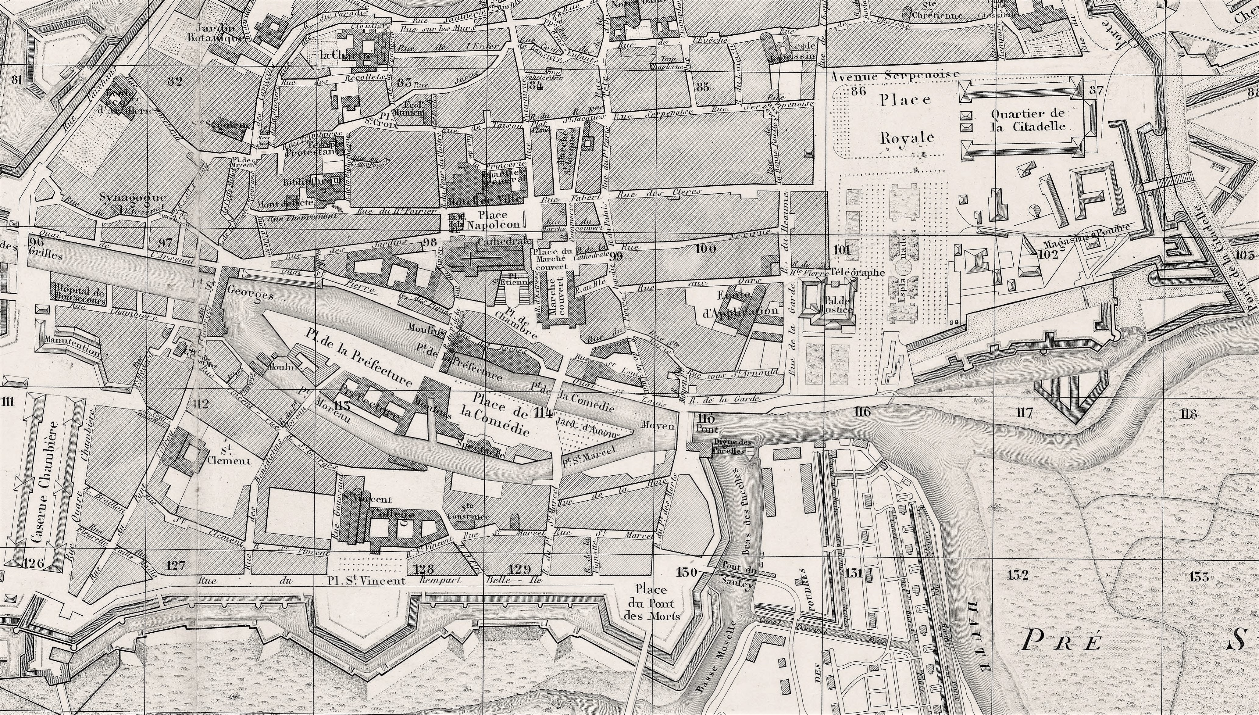 Metz Plan Fietta Frères 1858 - Détail du centre ville